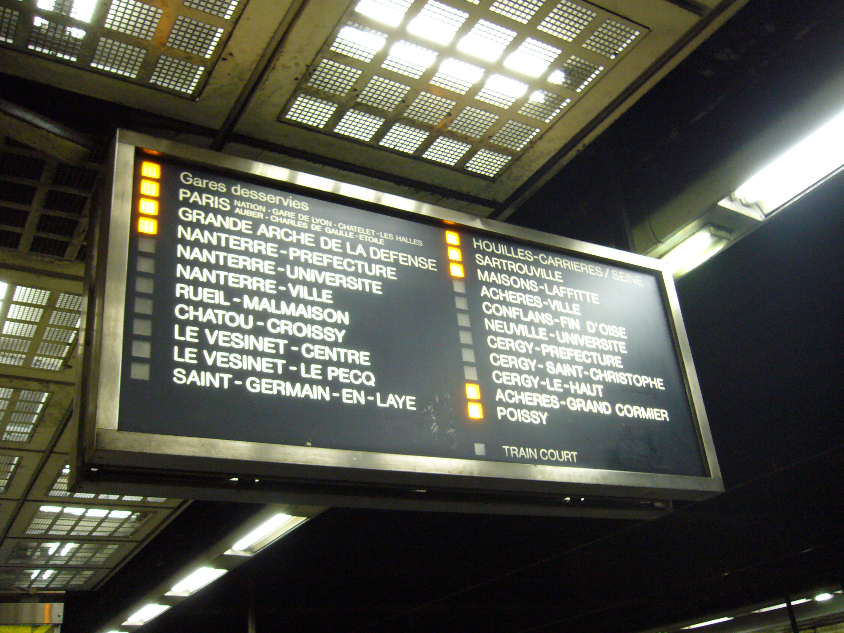 Un panneau SIEL de direction à la gare de Vincennes sur la ligne A du RER d'Île-de-France.